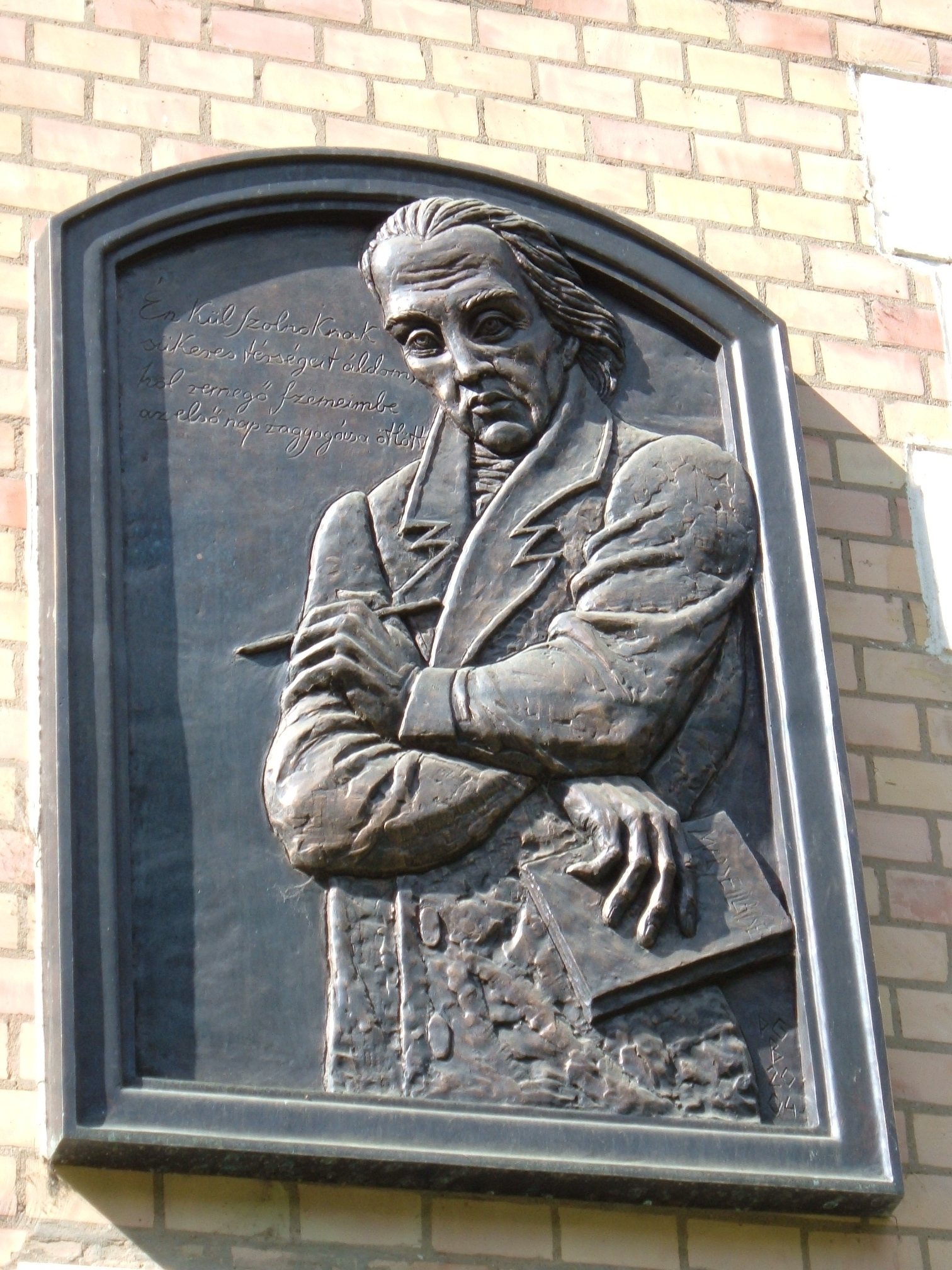 Verseghy Ferenc domborműve a szolnoki Verseghy Ferenc Gimnázium épületének falán